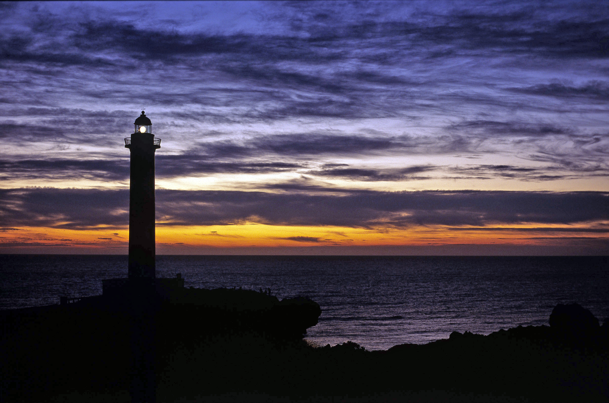 Zampa Misaki Todai, Yomitan, Okinawa, Japan 残波岬灯台 沖縄県読谷村